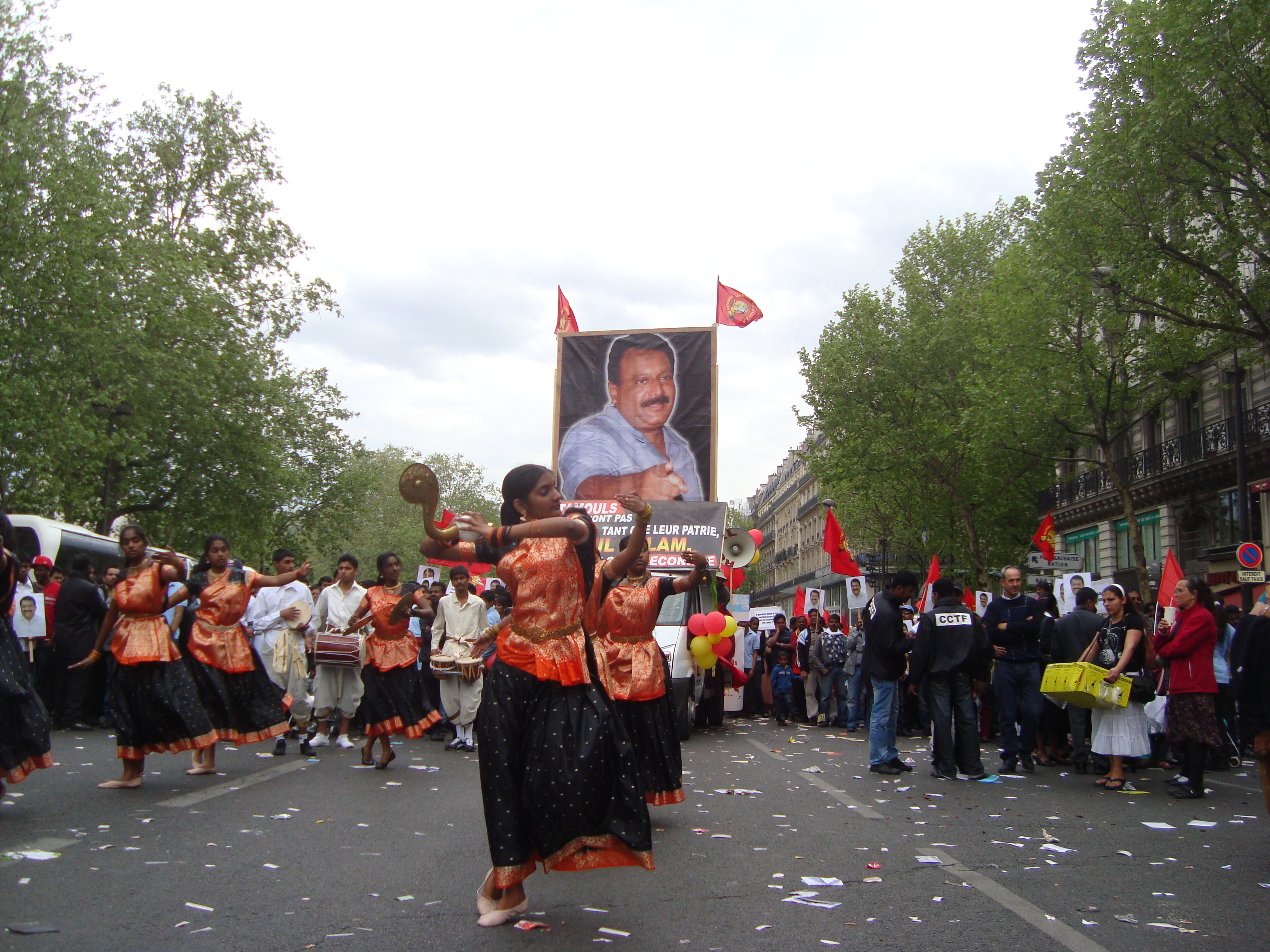 Manifestation des Tamouls à Paris le 1er mai 2010.